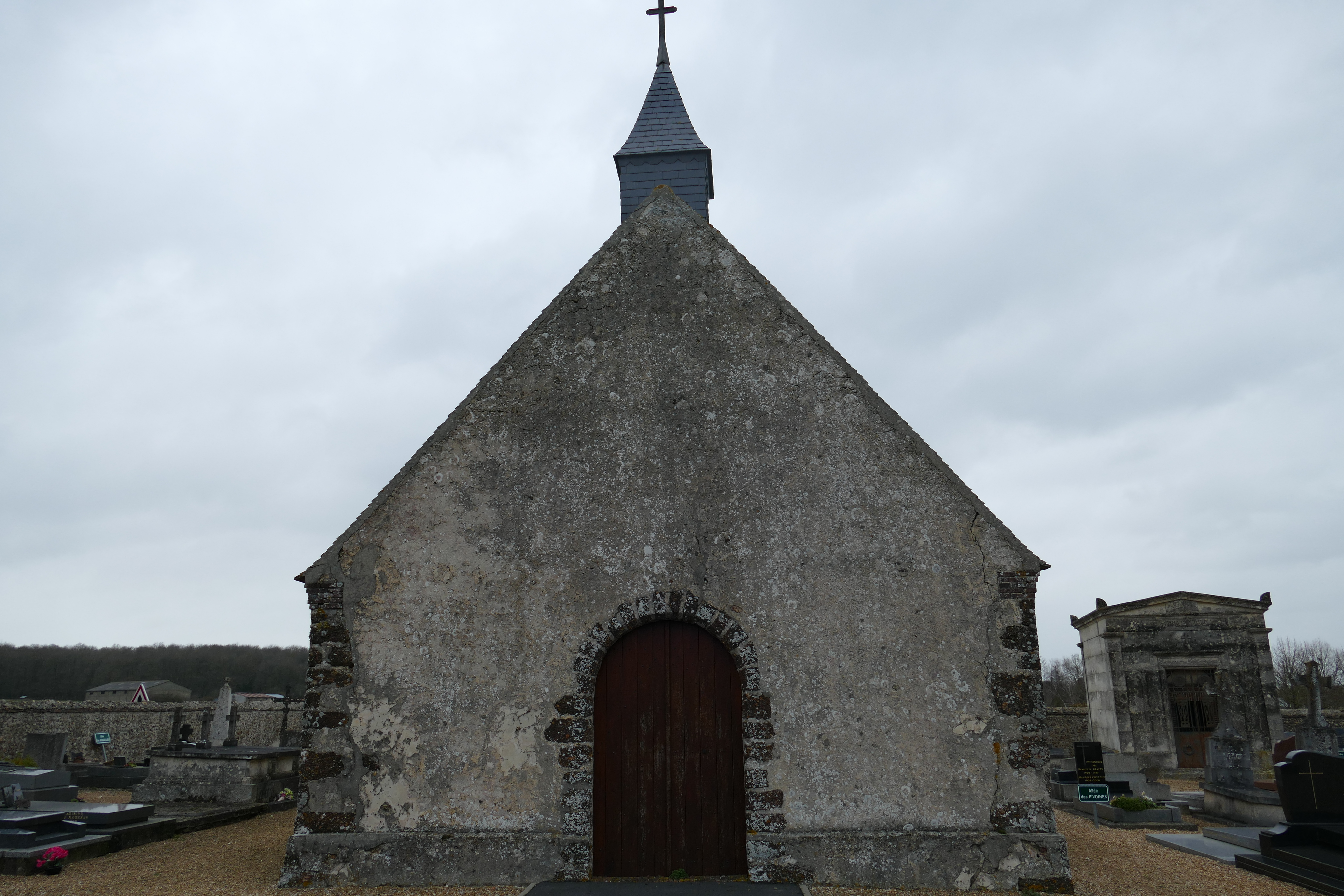 Chapelle Saint-Cyr, cimetière de Senonches (28), 2020